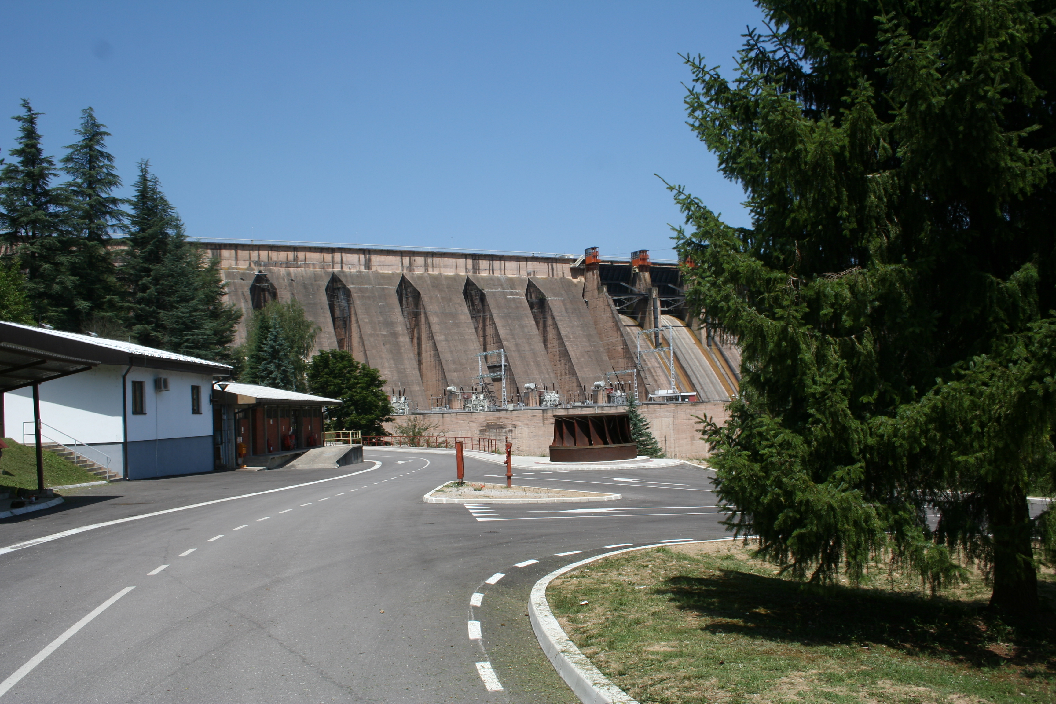 Hidroelektrana Bajina Bašta